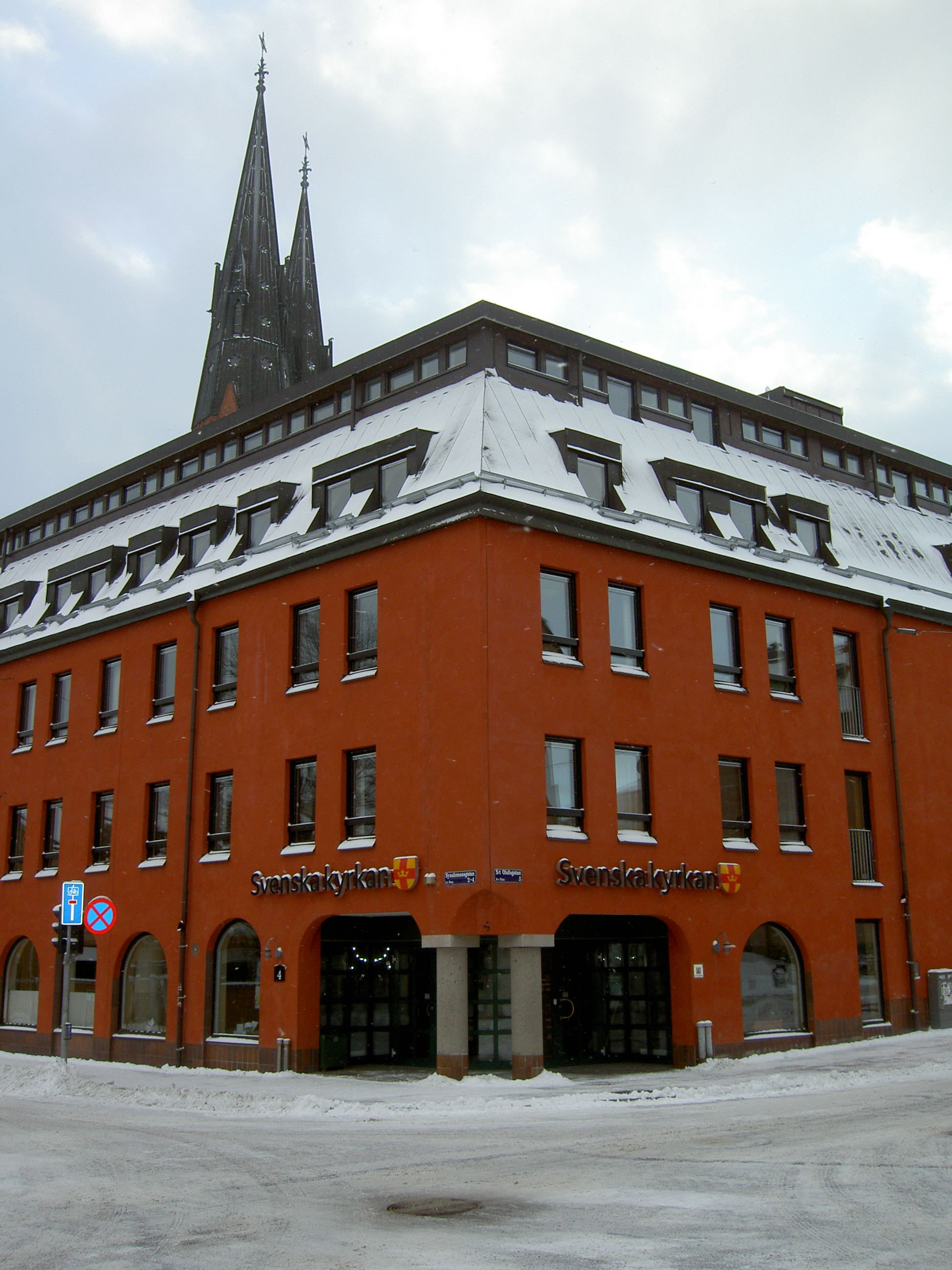 Kyrkans hus